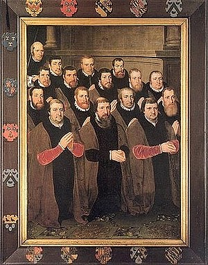 ANSELME DE BOODT (Vader van Boëtius) + (7de generatie / Oudgrootouder) JAN BREYDEL + BURGEMEESTER BRUGGE